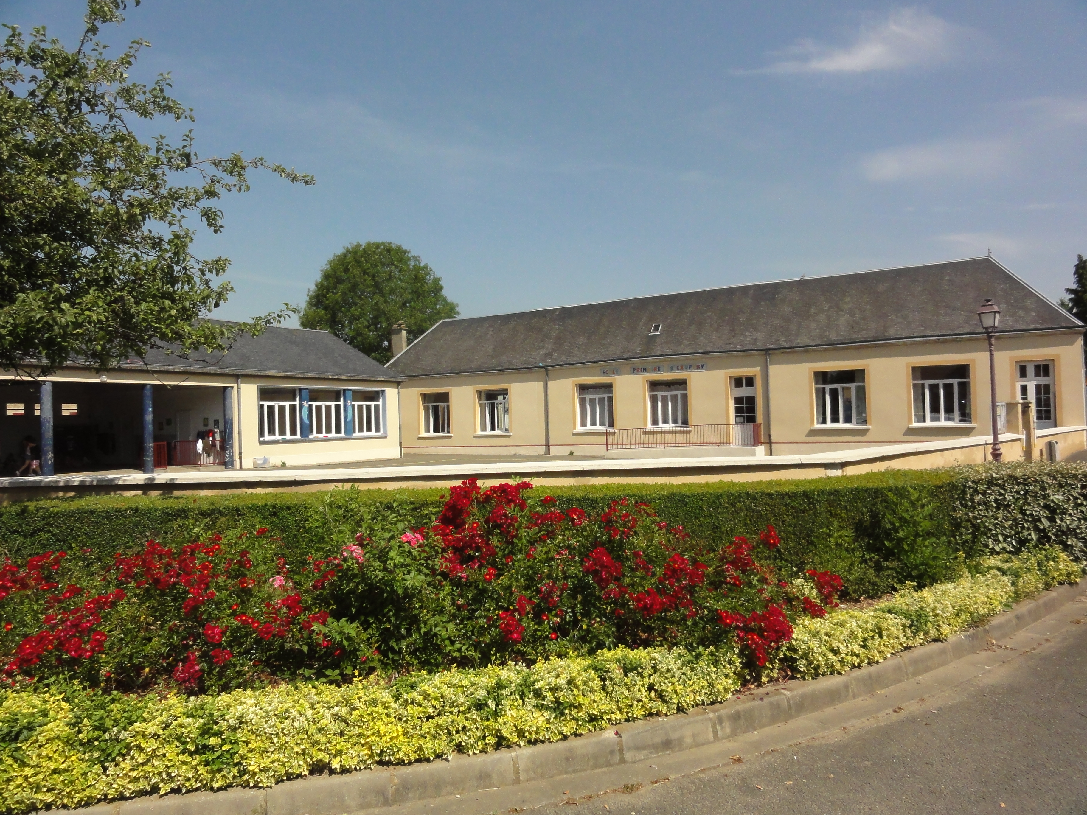 Courgains (Sarthe) école